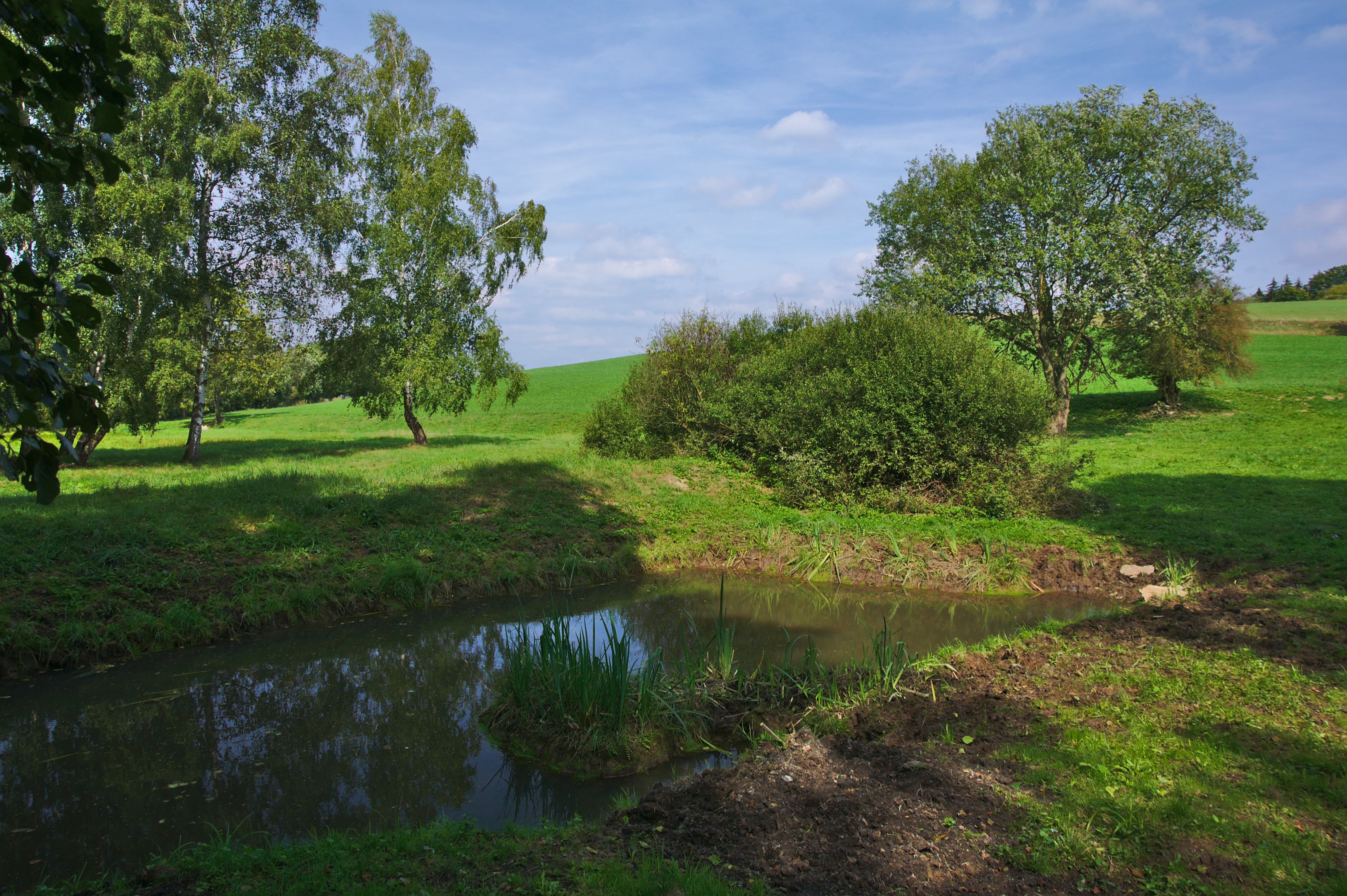 Přírodní památka U nádrže, okres Prostějov